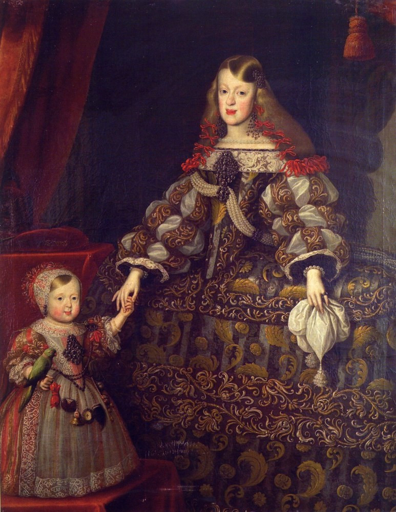 L'imperatrice Margherita con la figlia, l'arciduchessa Maria Antonia